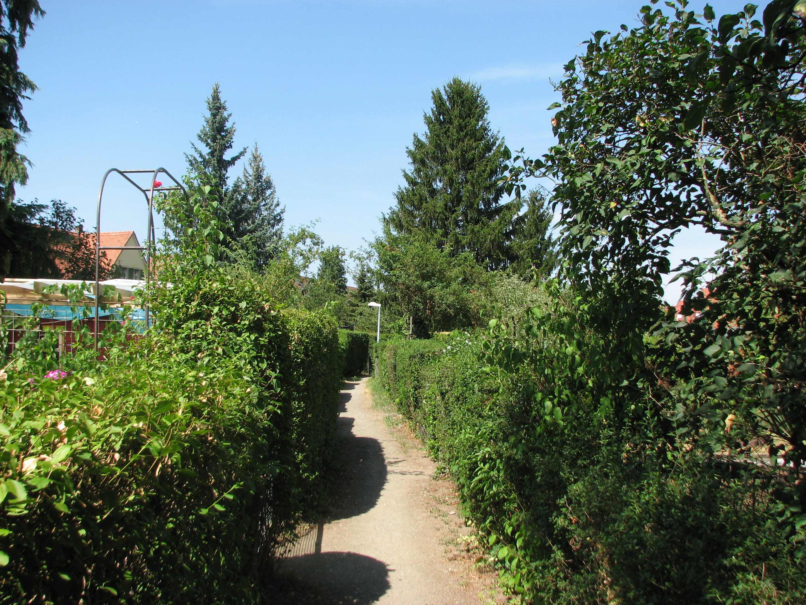 Gartenstadt Freiburg, Gärten Doppelreihe